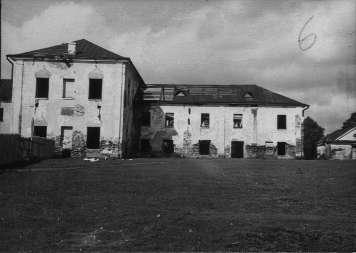 Беларуская (тарашкевіца): Дзярэчын (Dziarečyn), пляц Рынак (plac Rynak). Руіны кляштару дамініканаў